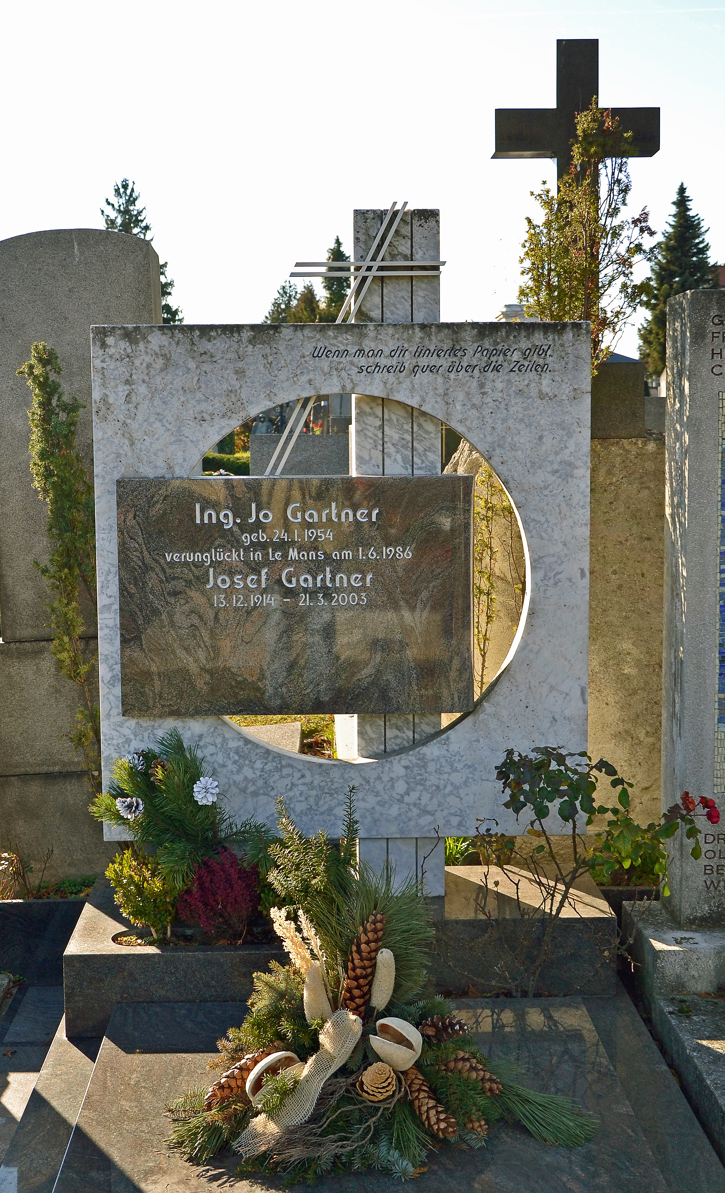 Grab Jo Gartner, Autorennfahrer, Döblinger Friedhof